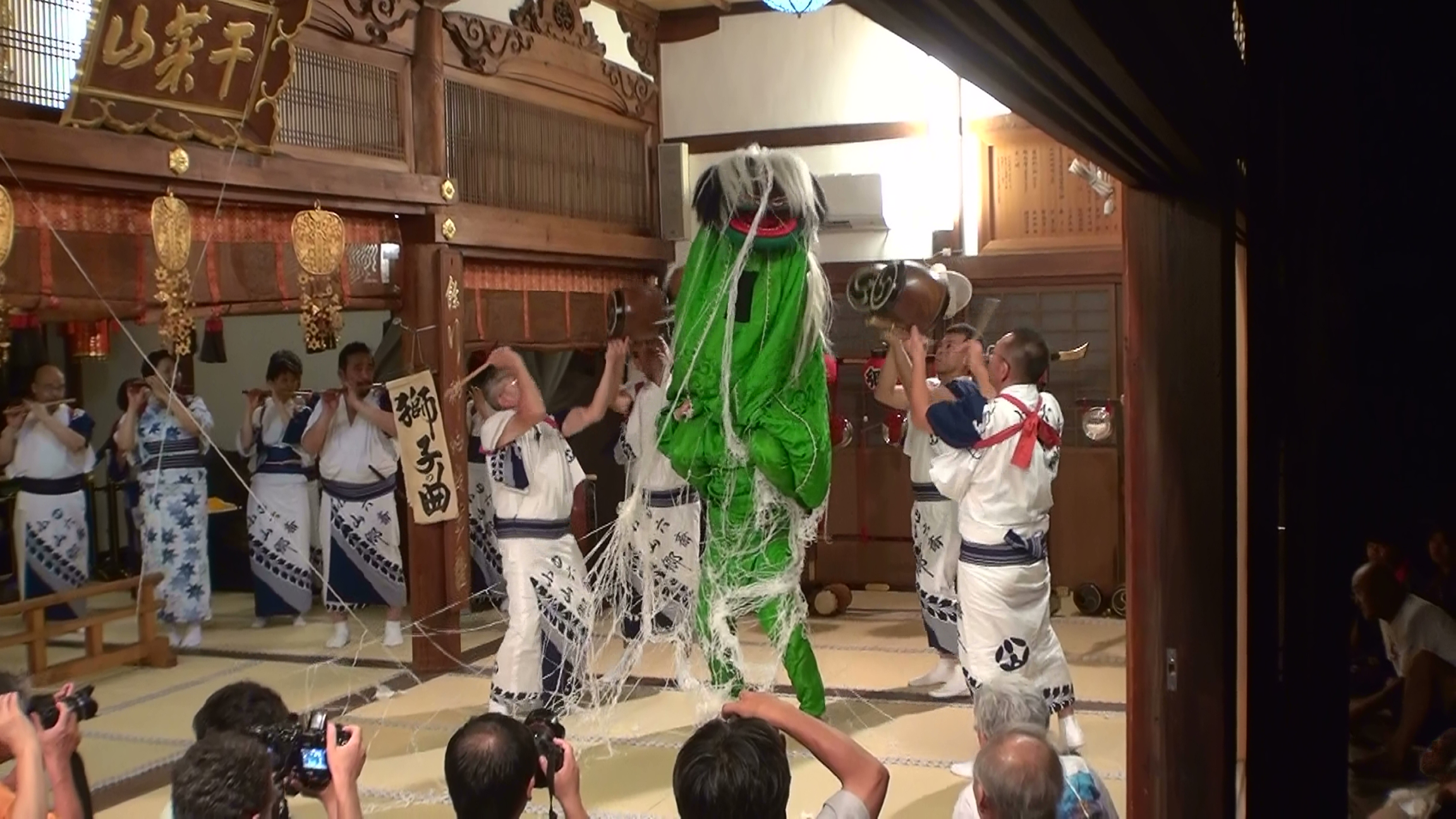 田中村六斎